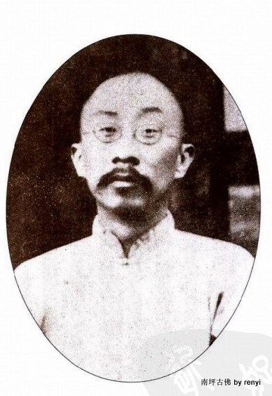 中文（台灣）: 施愚 肖像